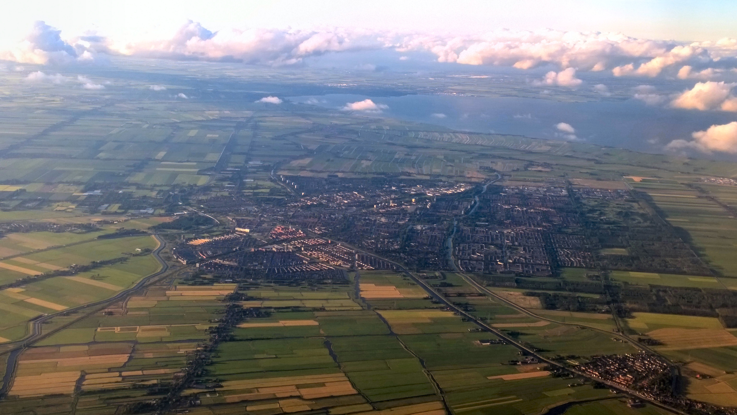 Luchtfoto van Purmerend, gezien naar het Noorden.